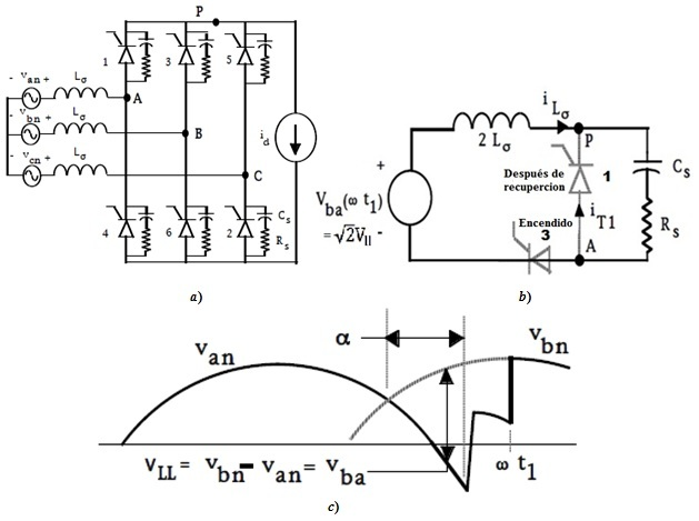 Snubber Tiristores